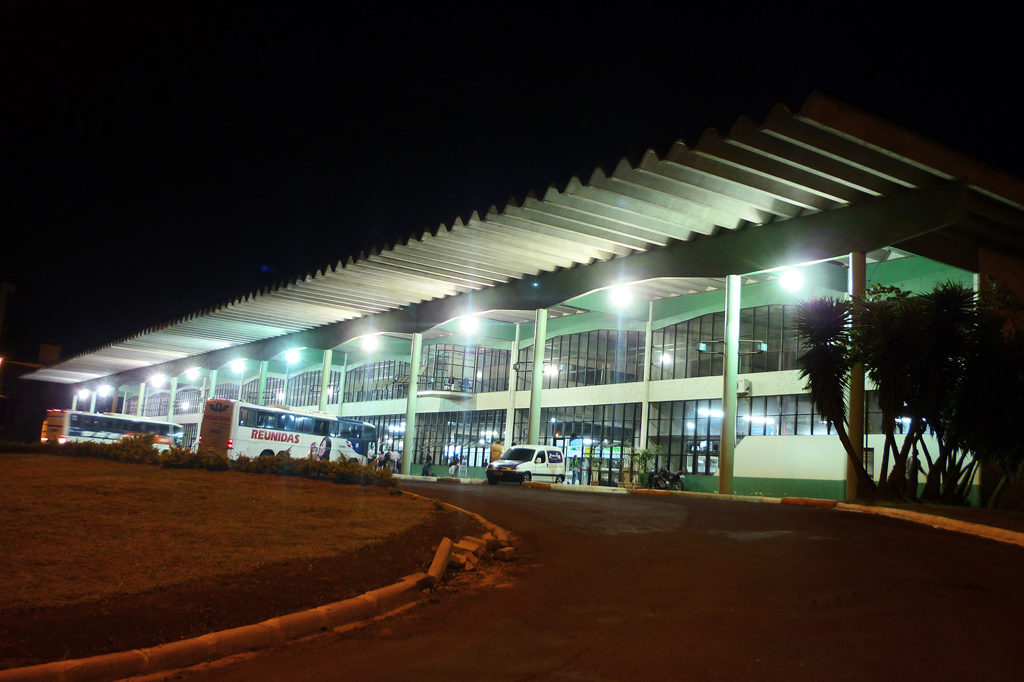 Terminal rodoviário da cidade de Chapecó, Santa Catarina, Brasil